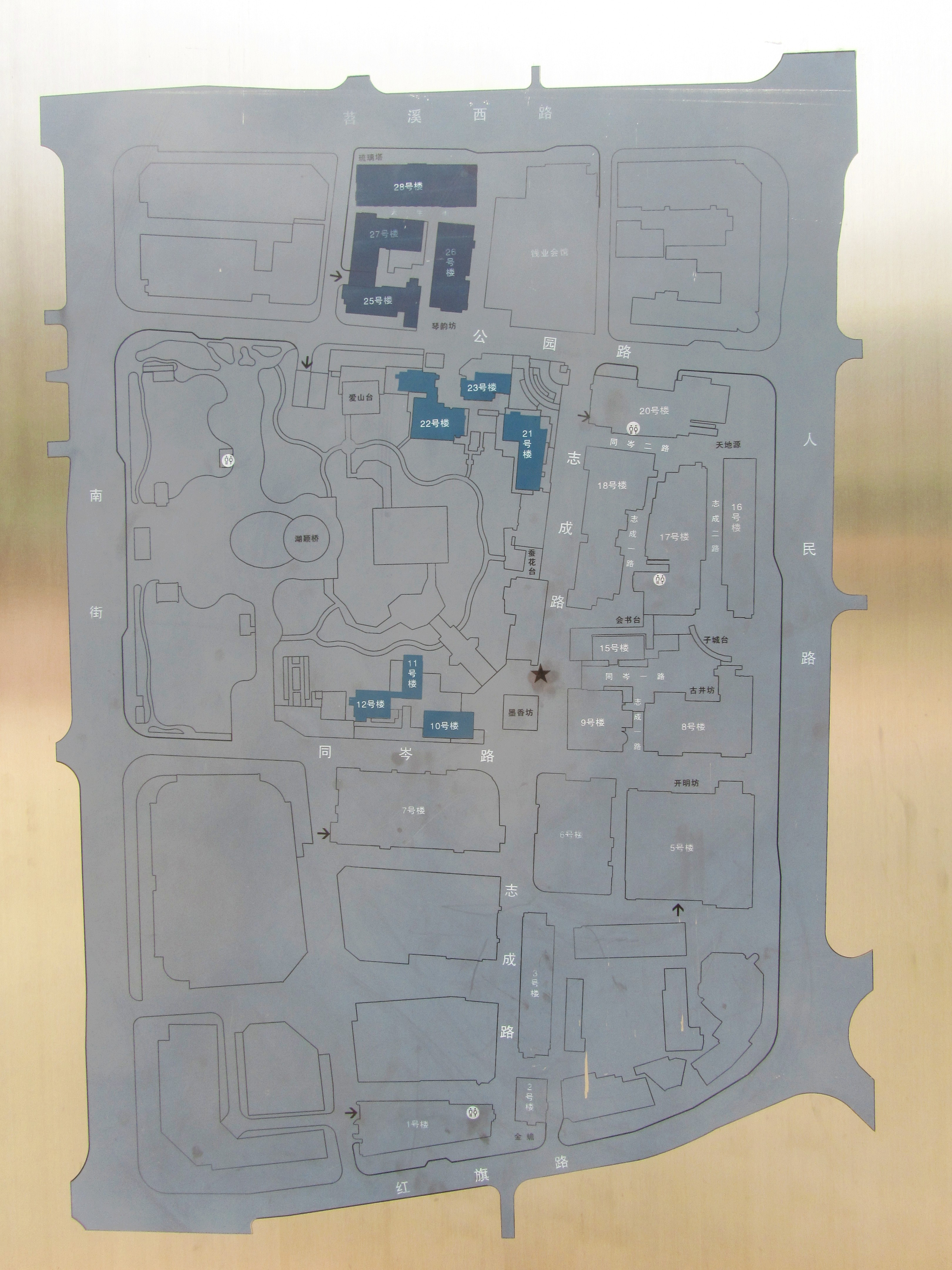 湖州爱山广场平面，湖州子城城墙遗迹位于其东北，志成二路中央，16号楼与17楼之间。